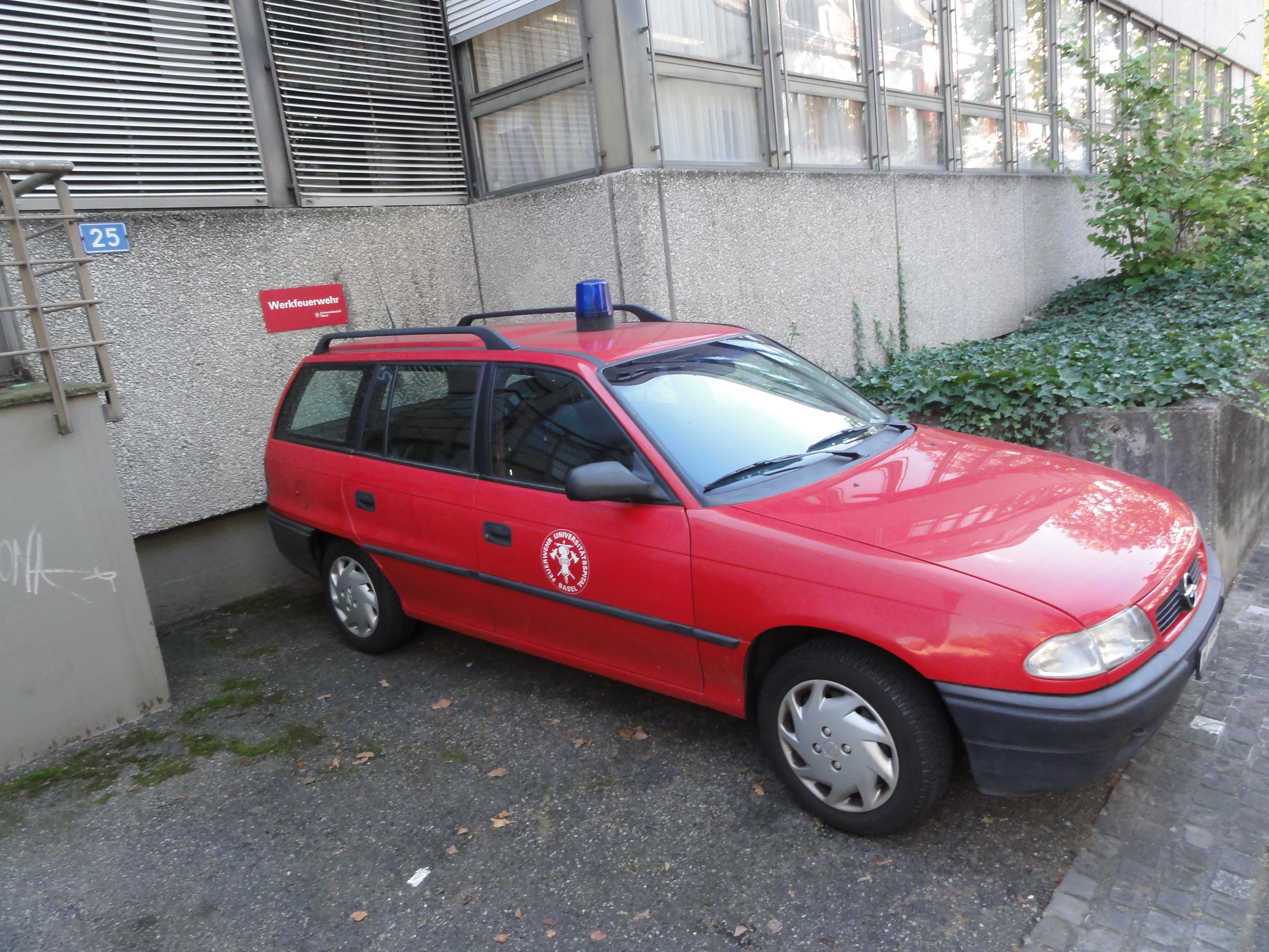 Basel — Einsatzfahrzeug der Werkfeuerwehr des Universitätsspitals Basel der Universität